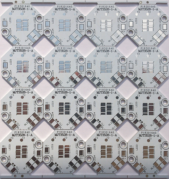 برد مدار چاپی آلومینیوم بیس تولید شده توسط عرش گستر